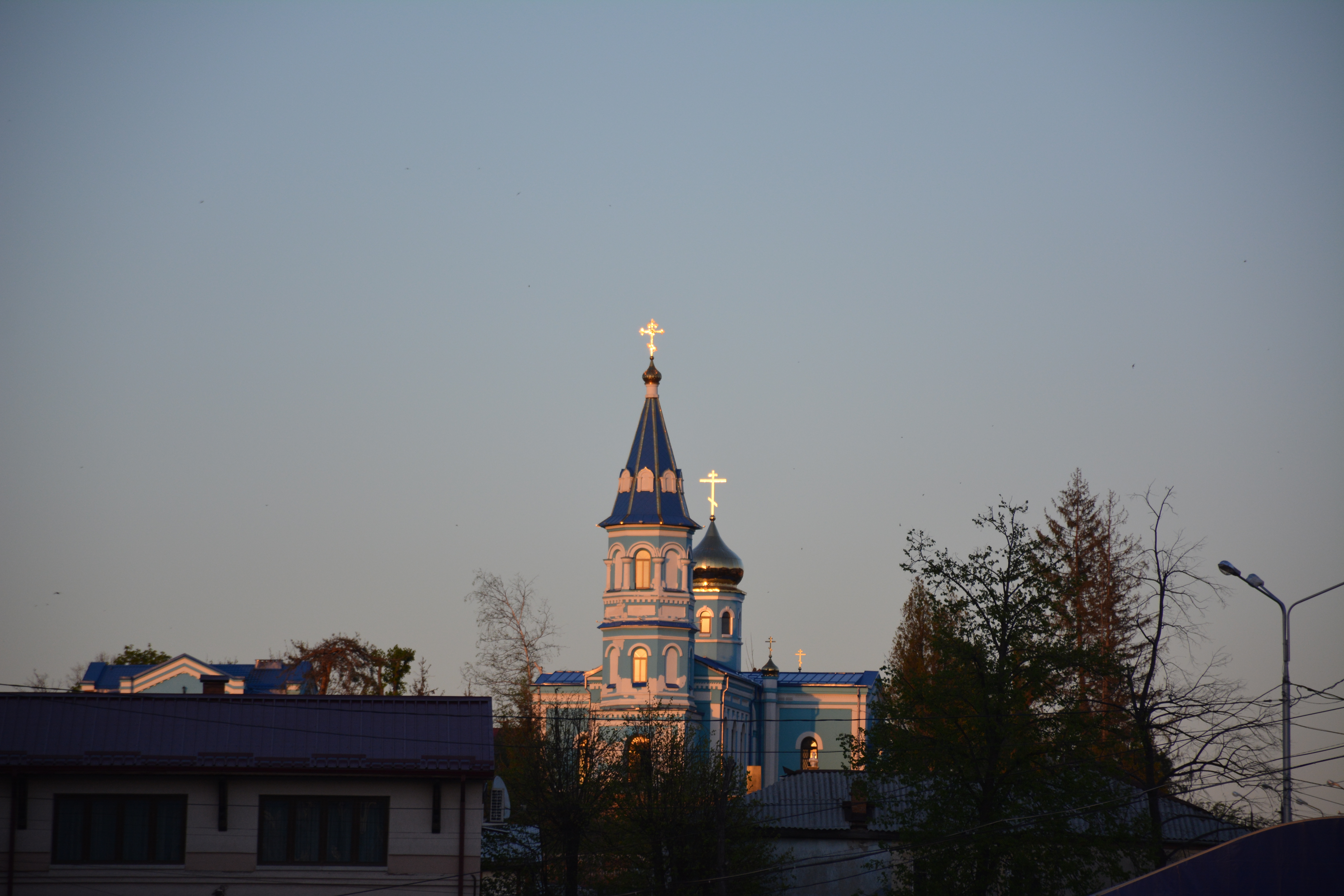 Осетинская церковь: улица Войкова, 20 / улица Хетагурова, 23, Владикавказ, Северная Осетия